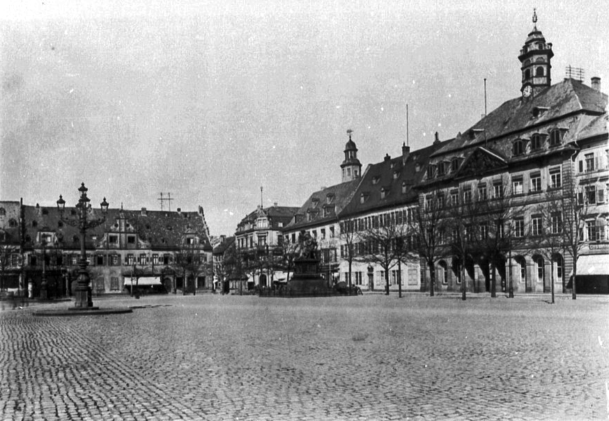 Neustädter Markt in Hanau nach Nordwesten.